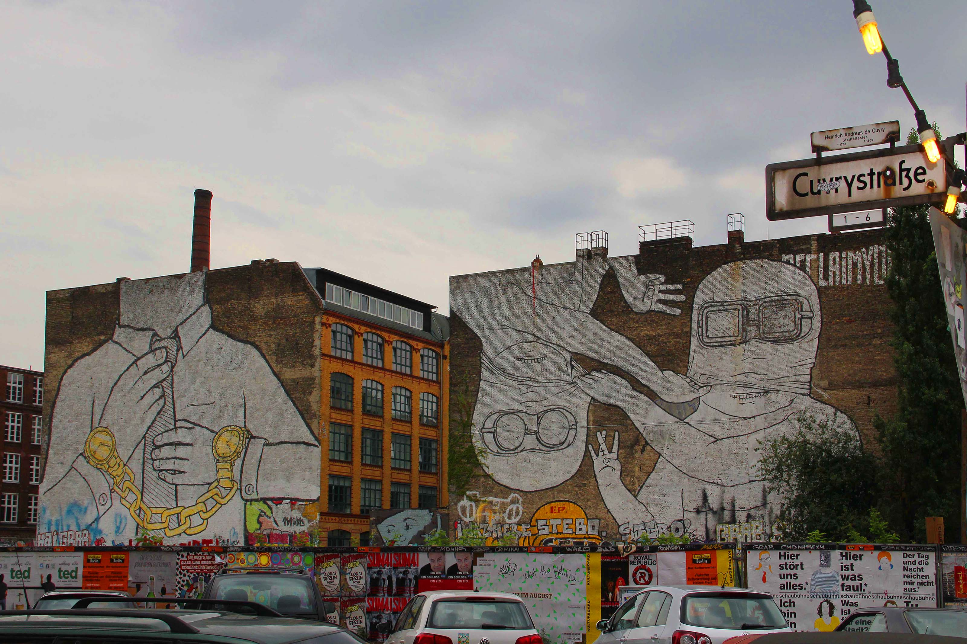 Berlin-Kreuzberg, Blue, Wandmalerei (Mural), Cuvrystrasse 50